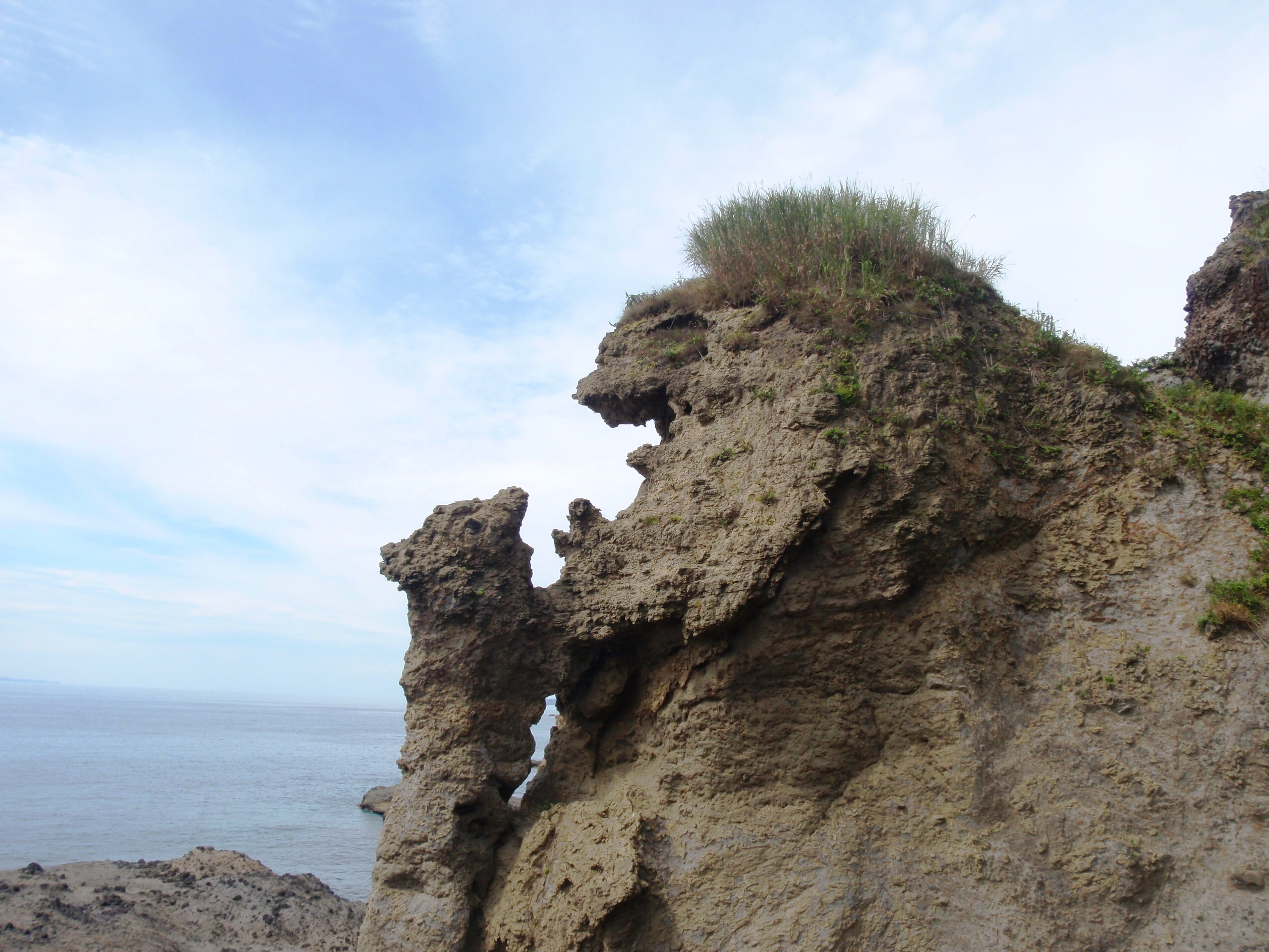 北海道せたな町大成区長磯海岸の親子熊岩